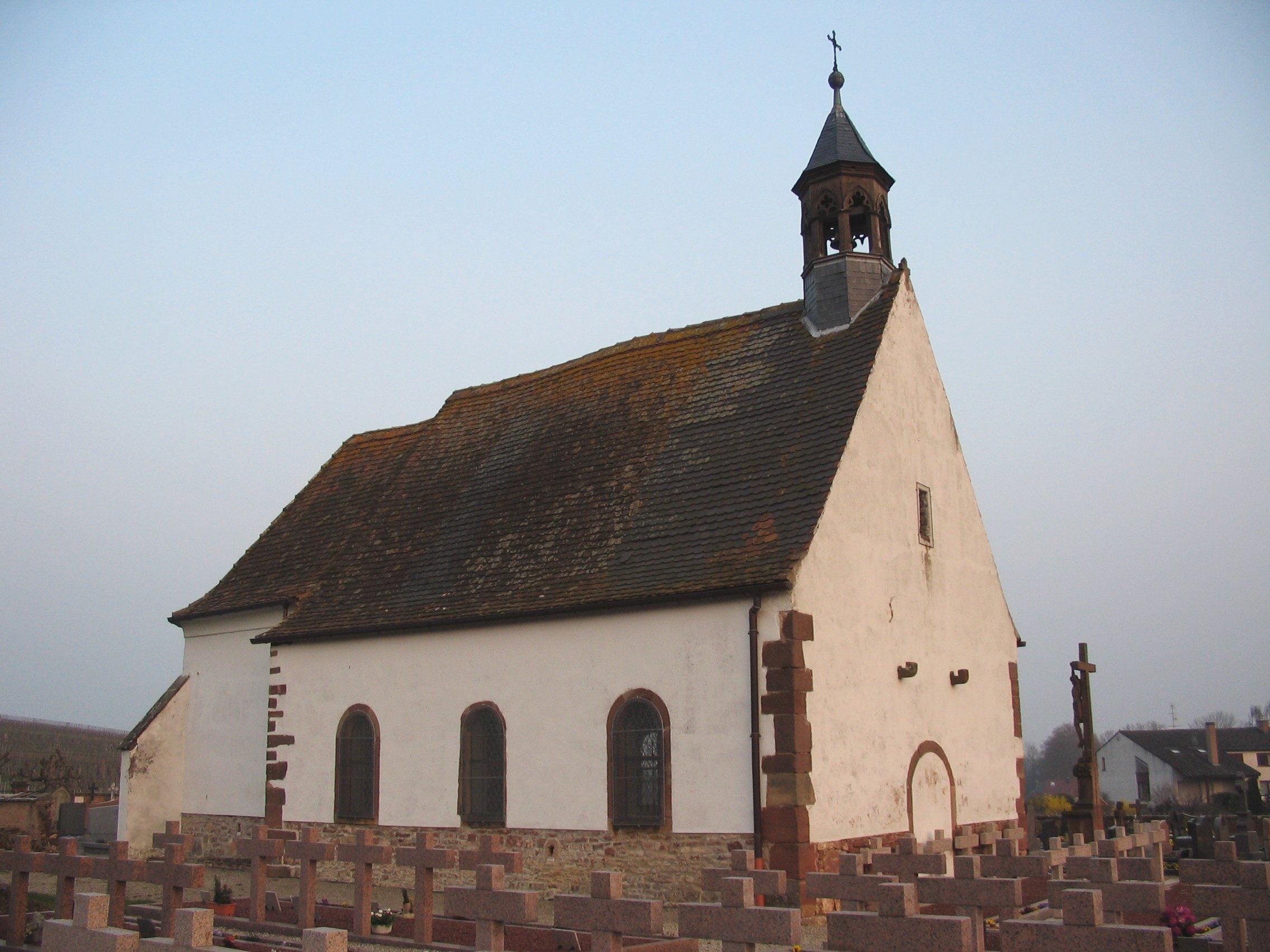 la chapelle Saint-Denis à Wolxheim, dans le Bas-Rhin